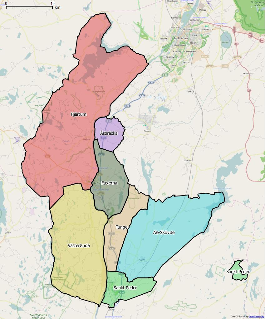 Distriktsindelningen i Lilla Edets kommun World file: 67.149192612406992 0 0 -67.149192612406992 1329324.52038803487084806 8035139.61227936483919621